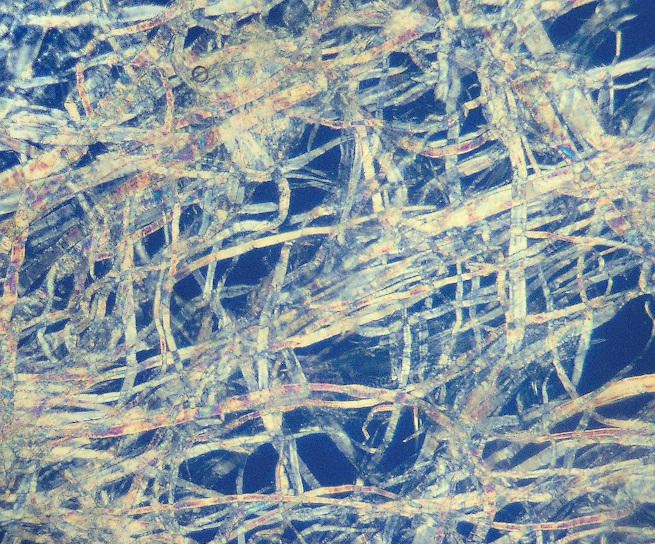 Zellstoff aus einem Papiertaschentusch bei 200fach mit Polfilter. Ausschnitt ca: 800µm x 600µm